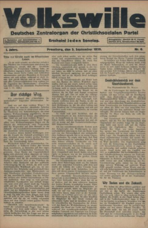 Titulný list novín Volkswille, ktoré vychádzali v Bratislave v r. 1920 - 1921.